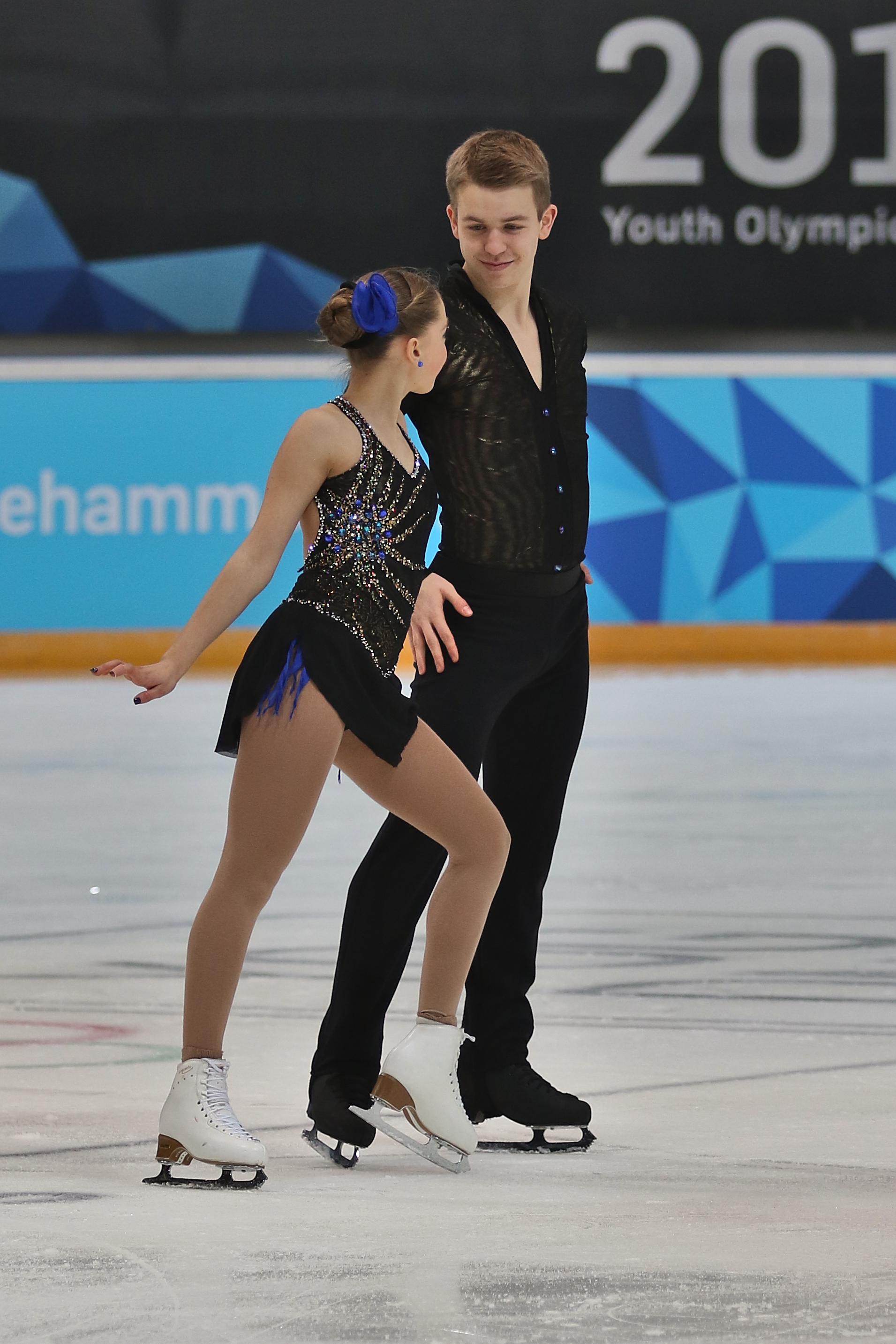 Lillehammer 2016 - Figure Skating Pairs Short Program - Justine Brasseur and Mathieu Ostiguy